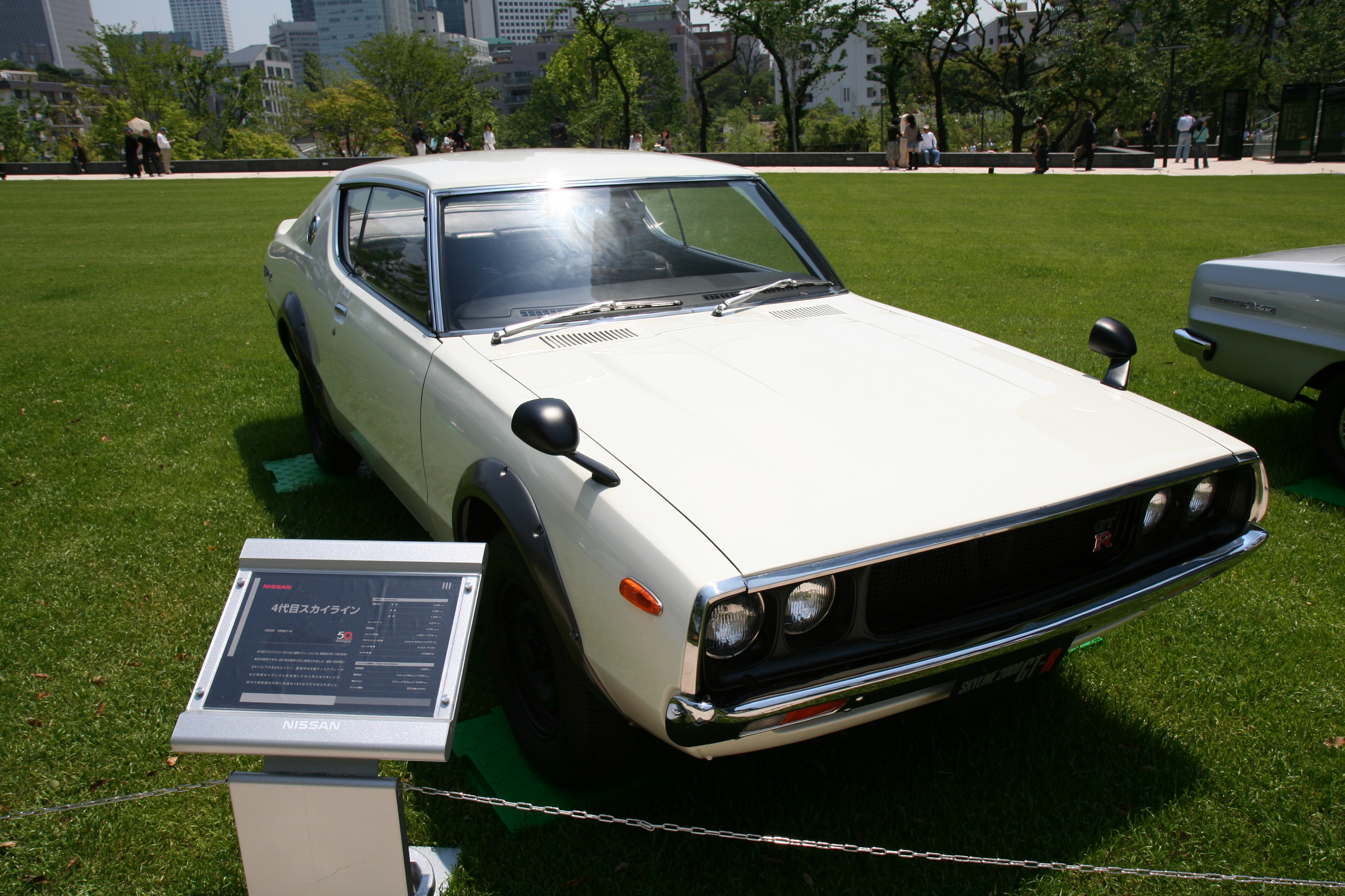 日産・スカイライン 4代目(C110系)。